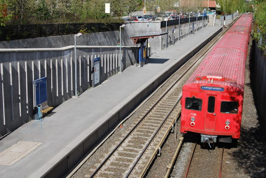 T-banen, stacja Eiksmarka (Oslo), maj 2009 r.